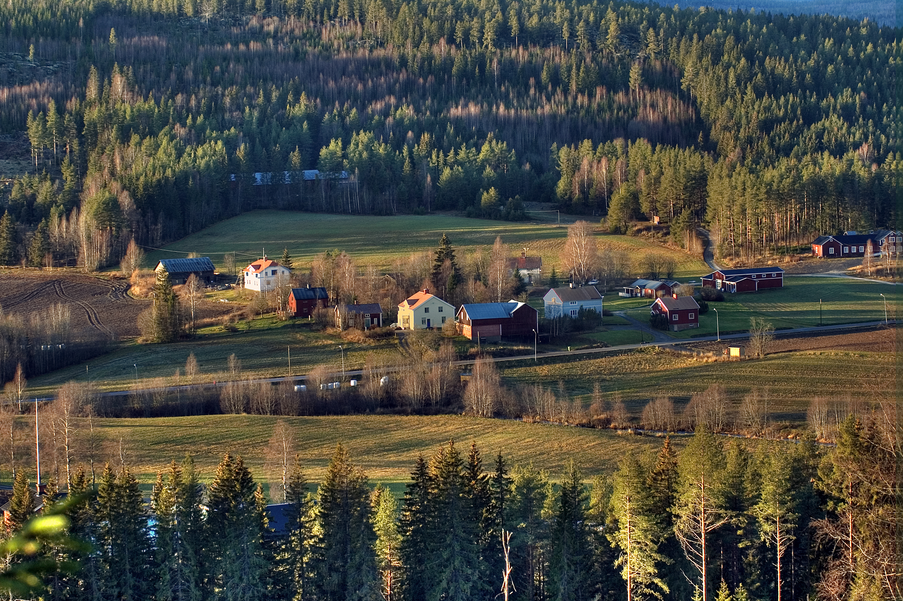 Bild över Ramsås by. Author: Thomas Hagfors, Härnösand, Sweden.